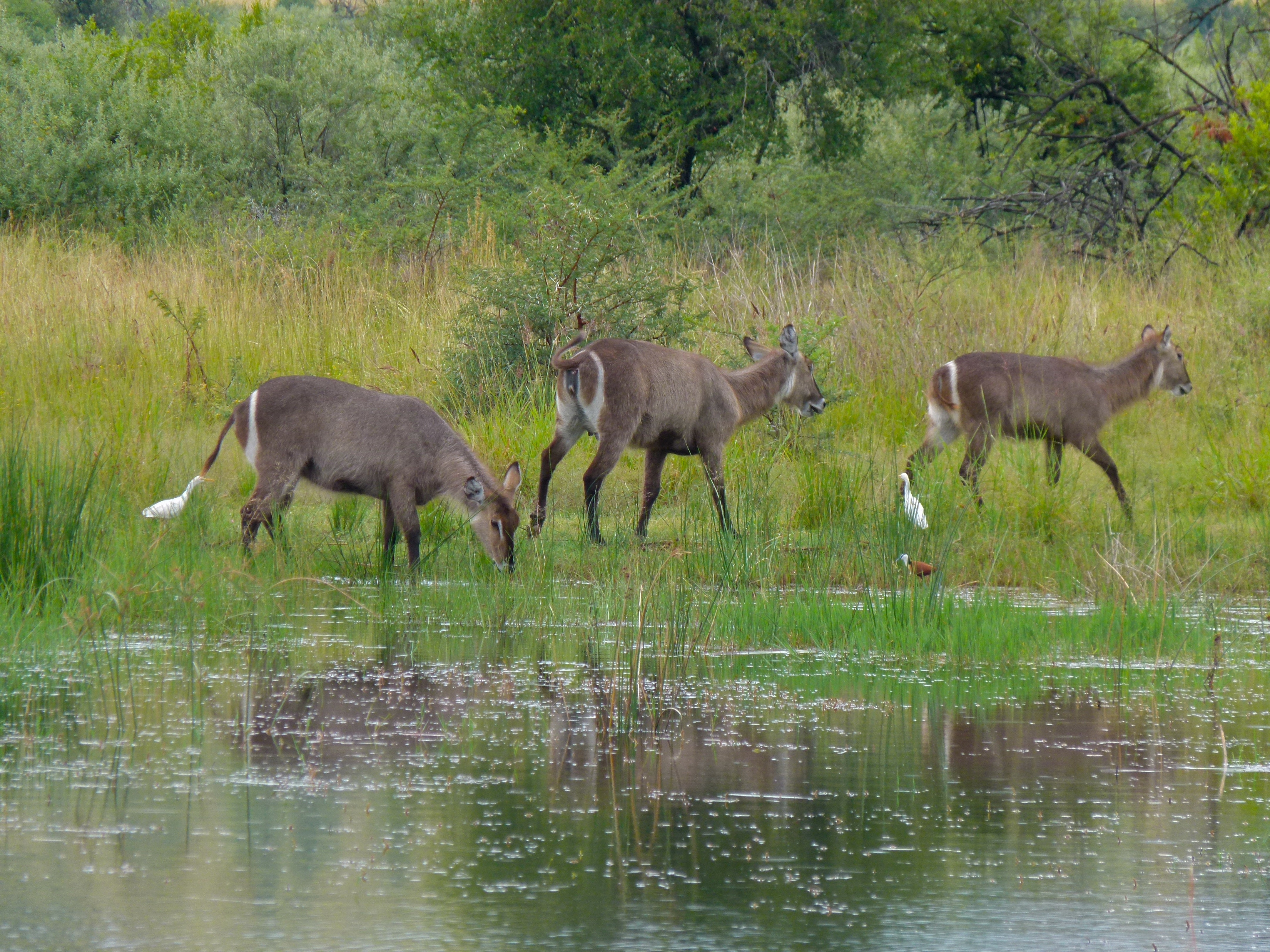 Mankwe Bird Hide, Pilanesberg, SOUTH AFRICA